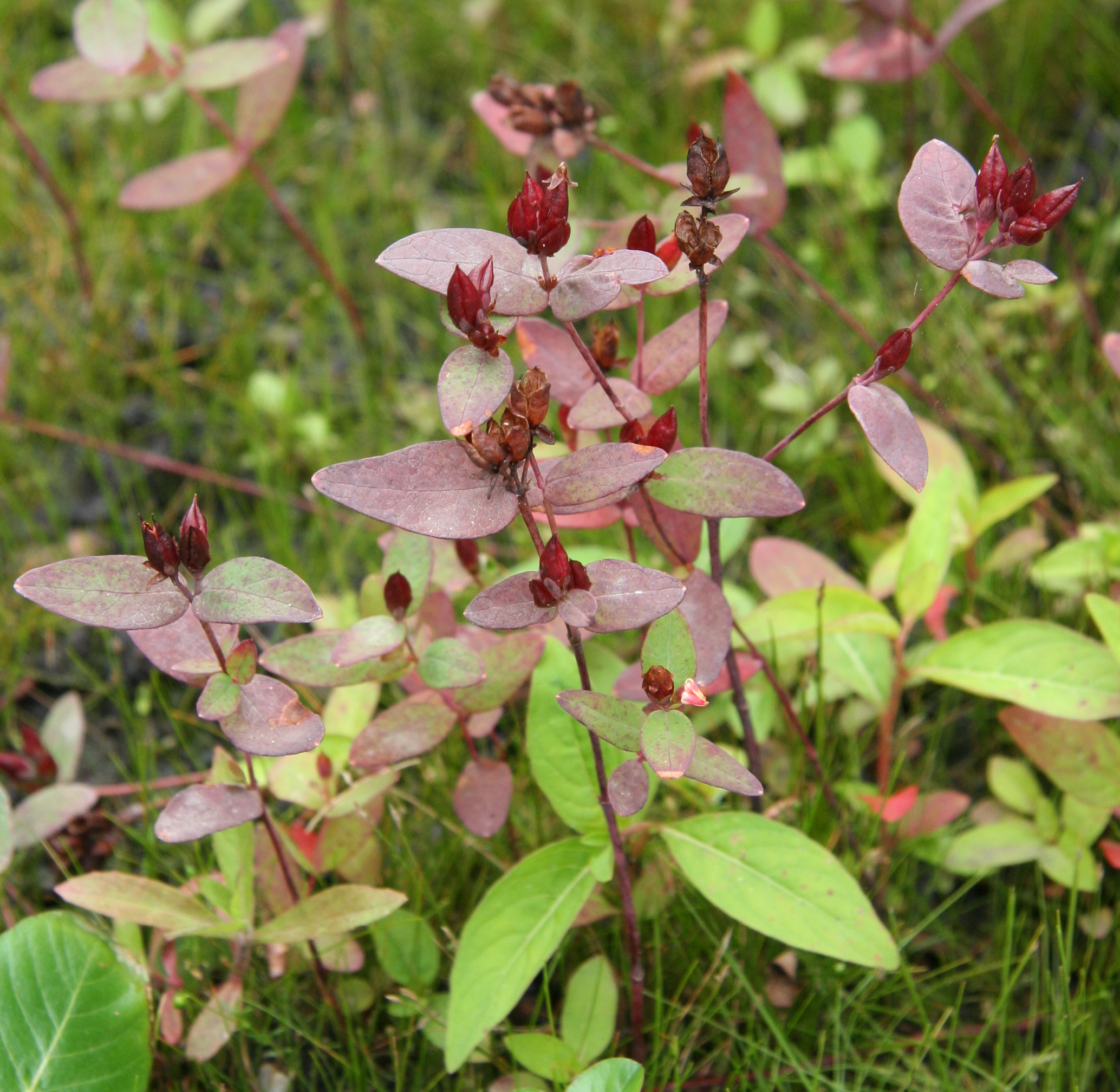 Triadenum fraseri im Botanischen Garten Dresden